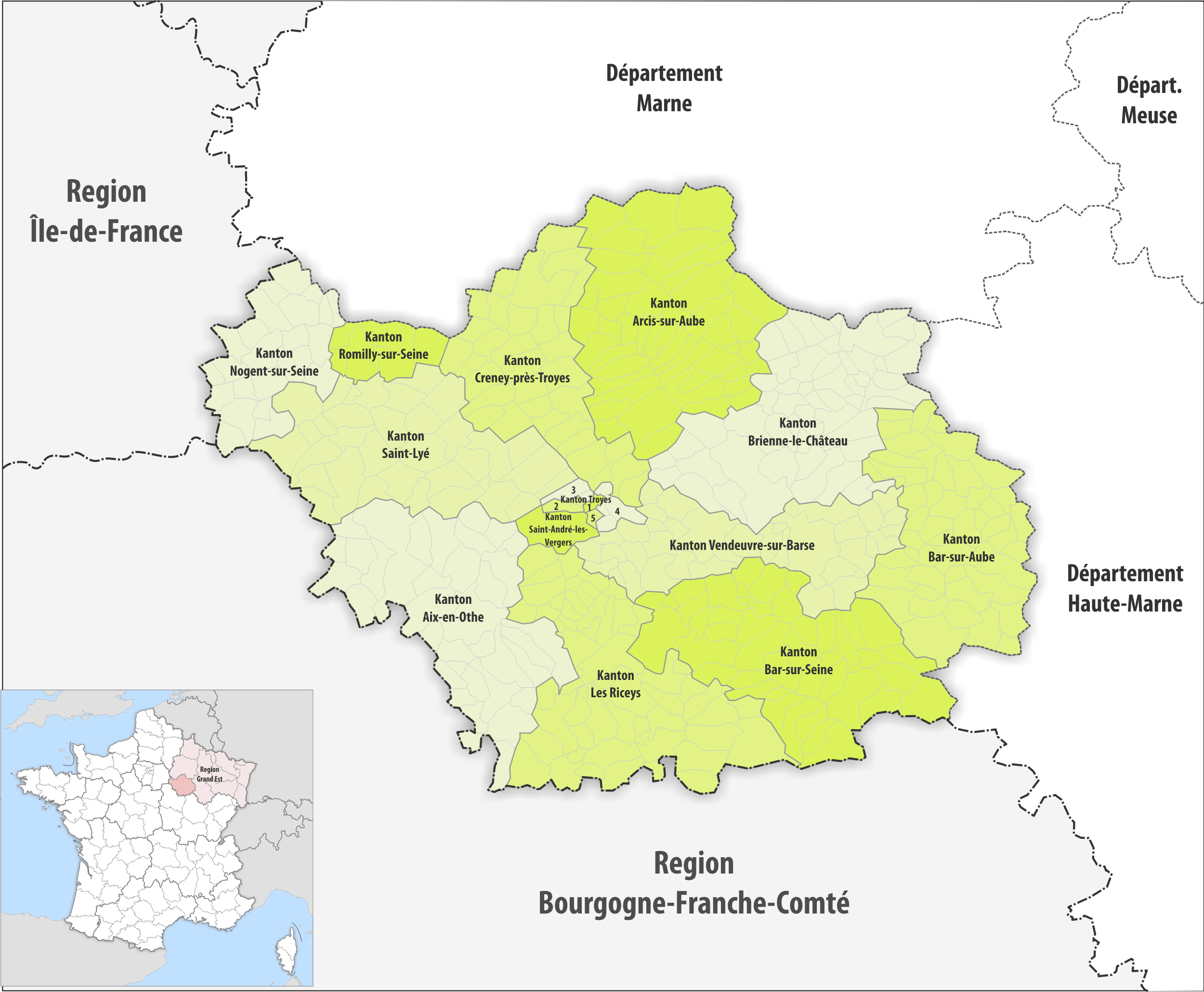 Gemeinden und Kantone im Departement Aube